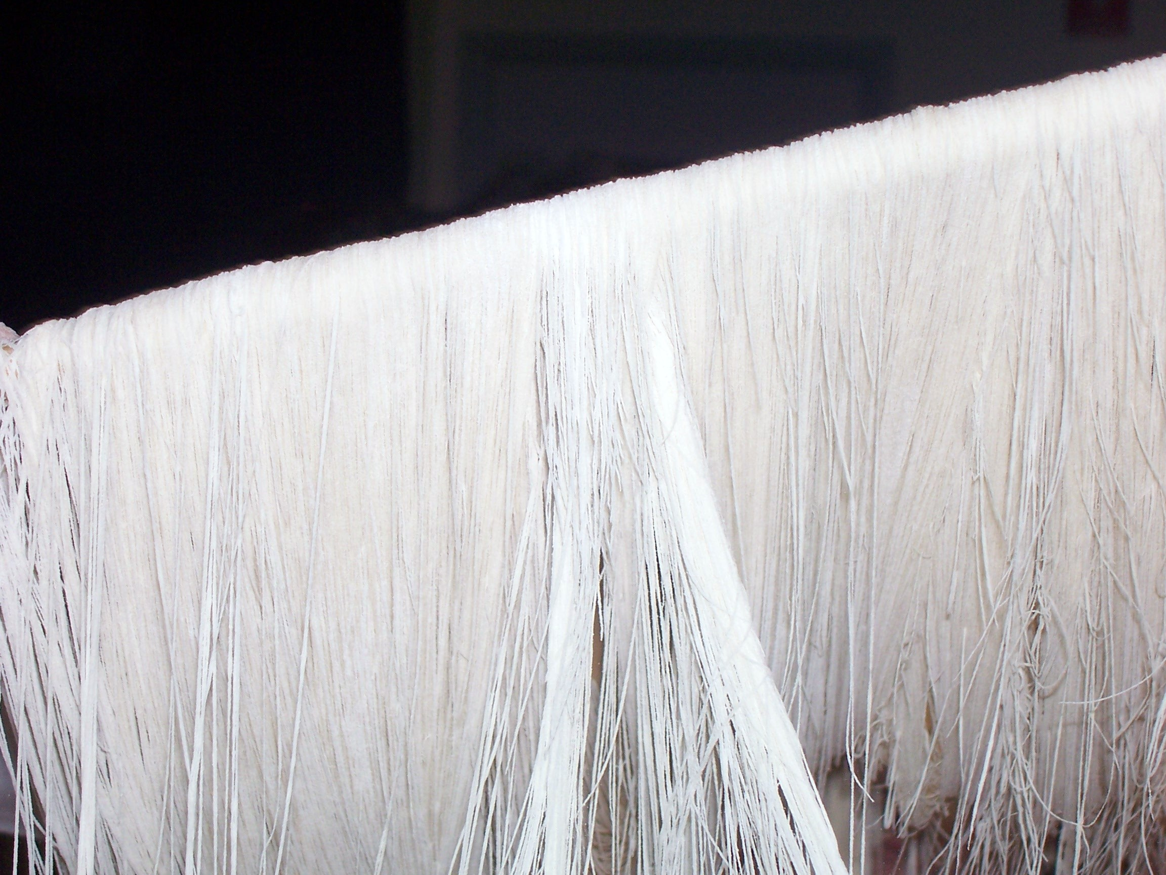 Lamian